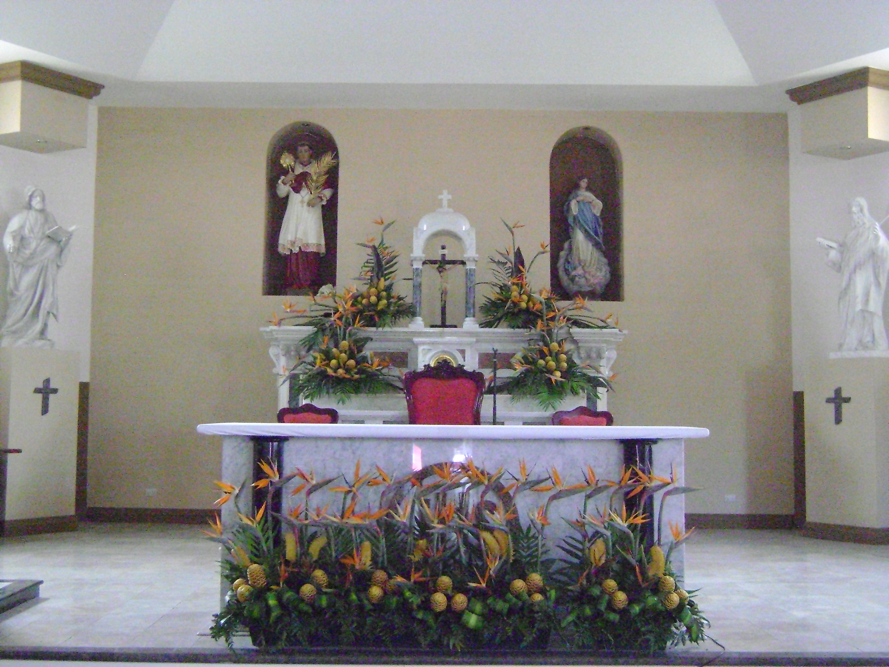 Presbiterio